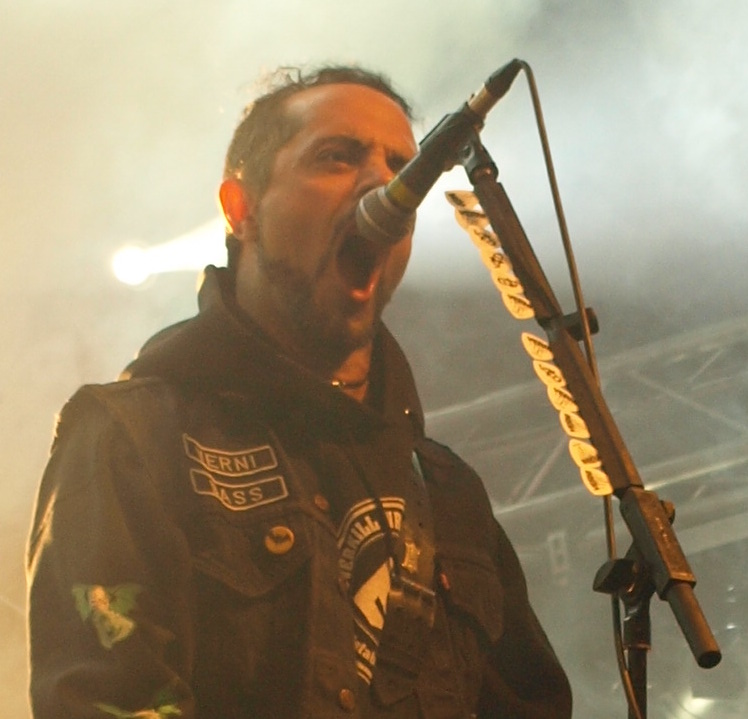 Auf ihren Einsatz wartende Plektrum-Sammlung von D.D. Verni, dem Bassisten von Overkill